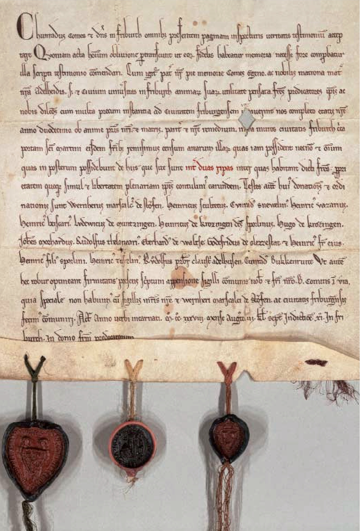 Urkunde von Graf Konrad mit dem Erlass des Hodstättenzins für das Predigerkloster in Unterlinden und die erste Erwähnung der Freiburger Bächle